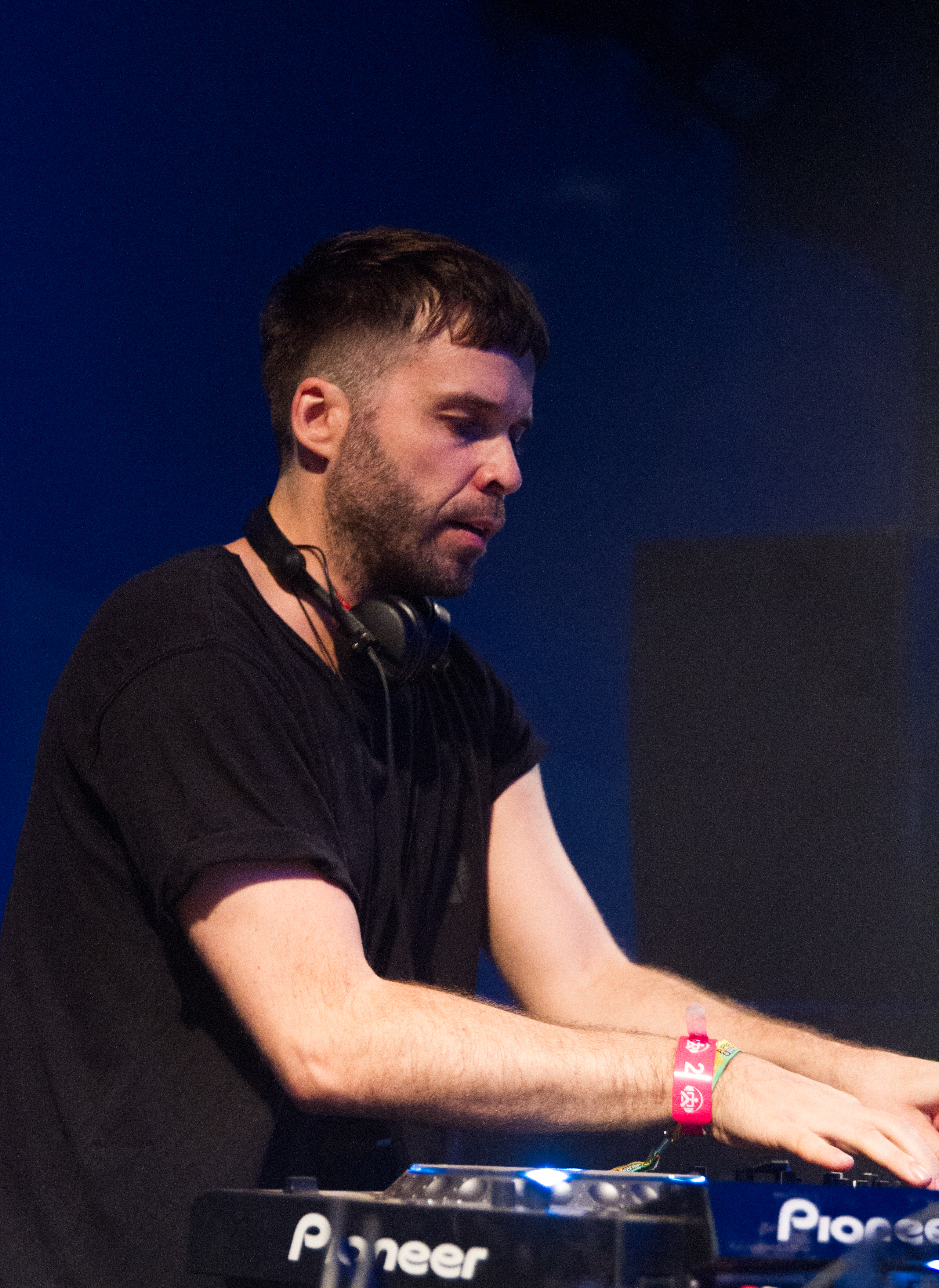 Lexy & K-Paul beim 14. Airbeat-One Dance Festivals das vom 16. bis 19. Juli 2015 auf dem Flugplatz Neustadt-Glewe stattfand.